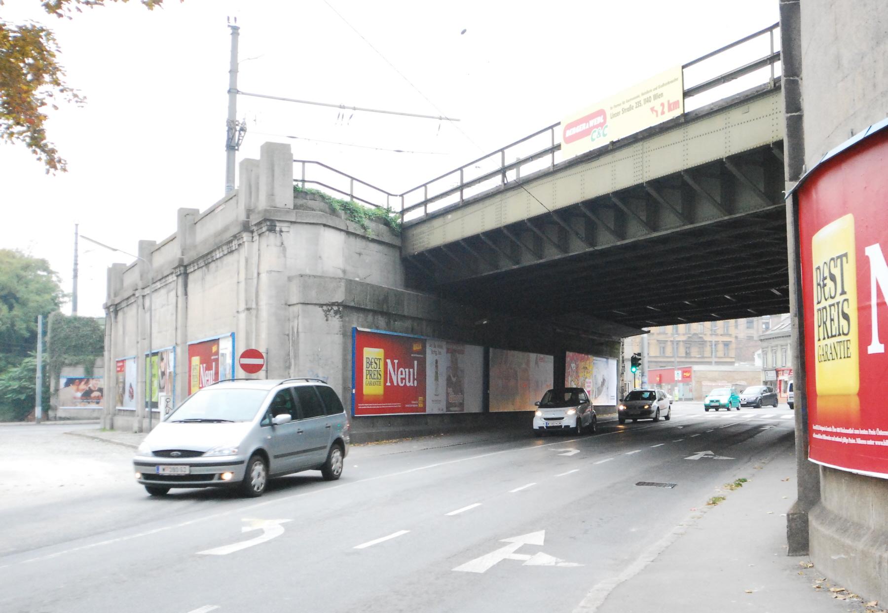 Die Brücken über die Linzer Straße und die Schloßallee im 14. Wiener Gemeindebezirk Penzing. Südansicht der Brücke über die Linzer Straße.